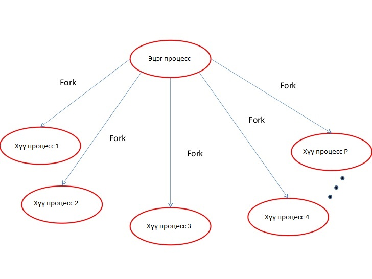 Монгол: Эцэг процесс